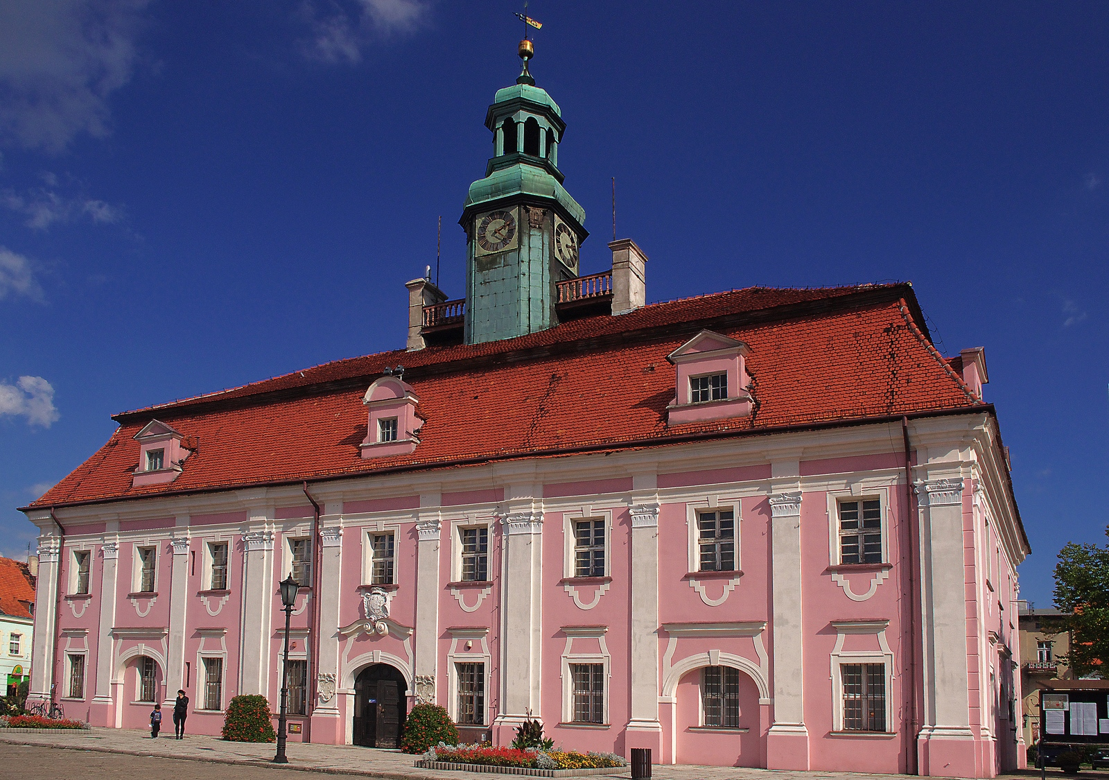 Rawicz - ratusz z 1756 r. (zabytek 329/Wlkp/A)